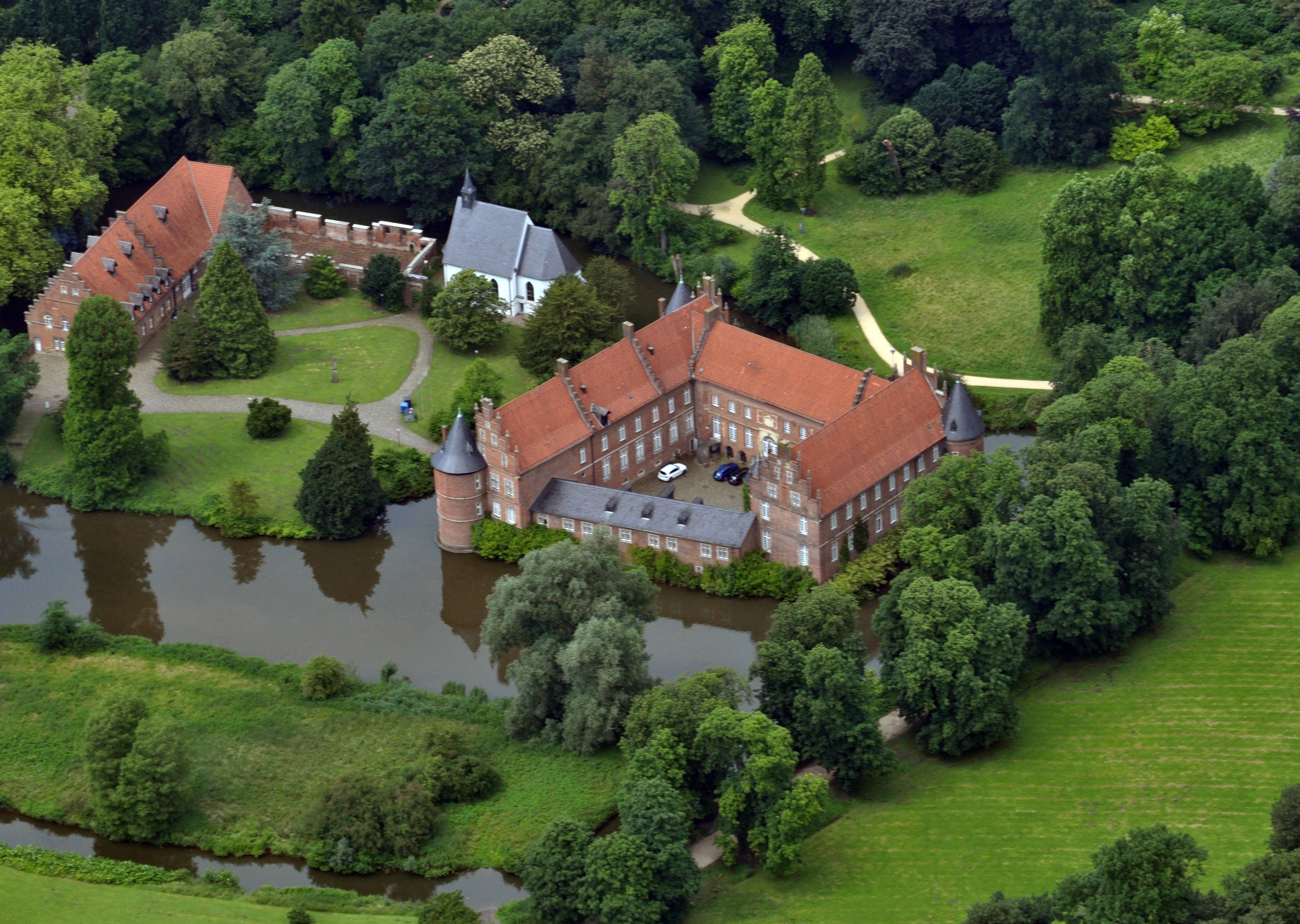 Schloss Herten, Ruhrgebiet